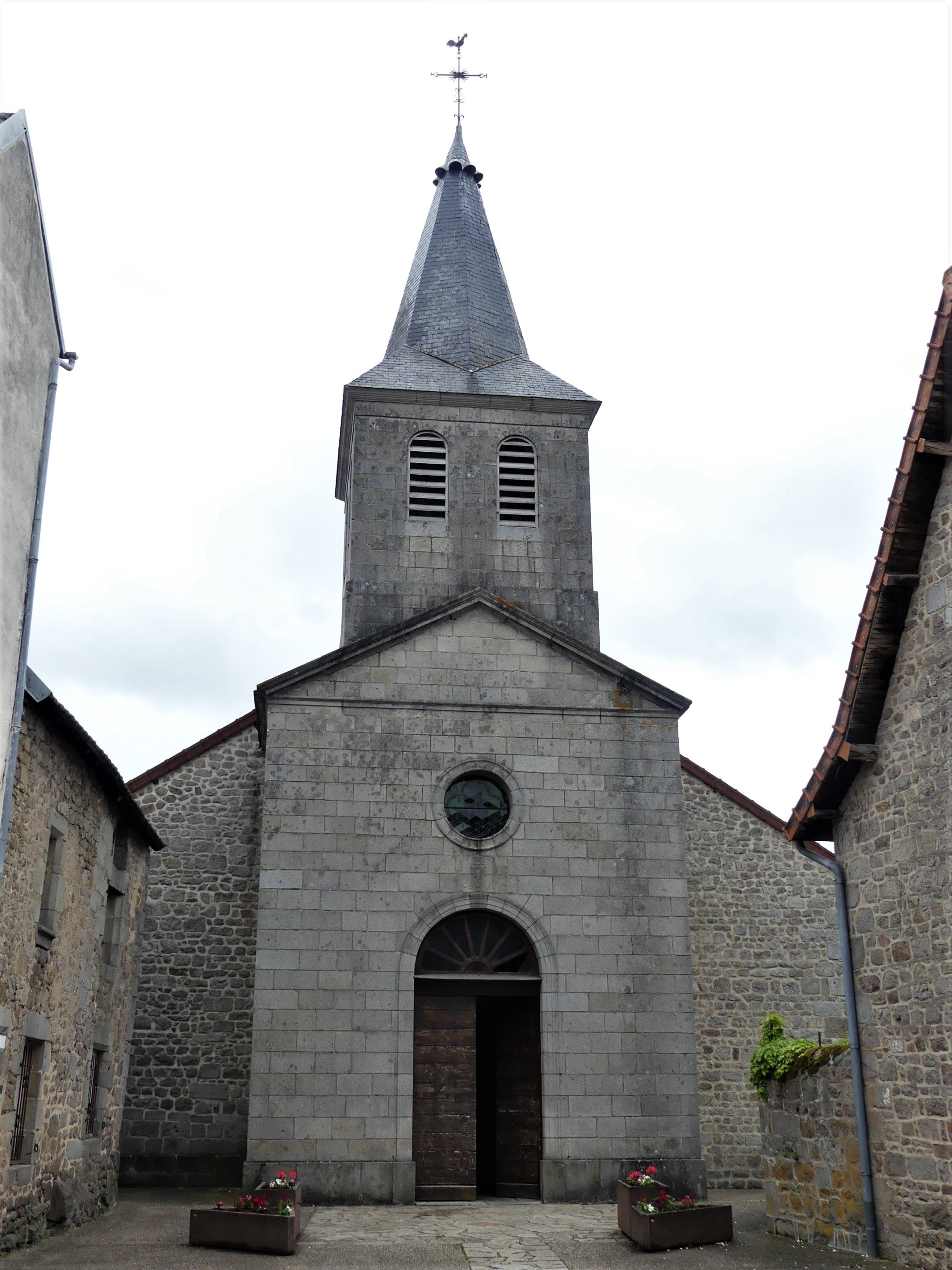 L'église de Bellegarde-en-Marche, Creuse, France.